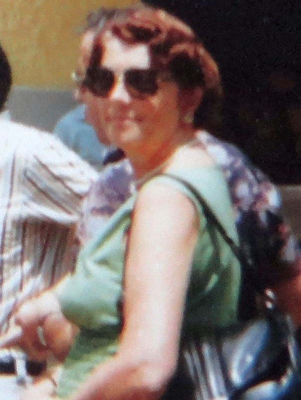 Gertrude Wagner, Interzonenturnier 1979 in Rio de Janeiro.